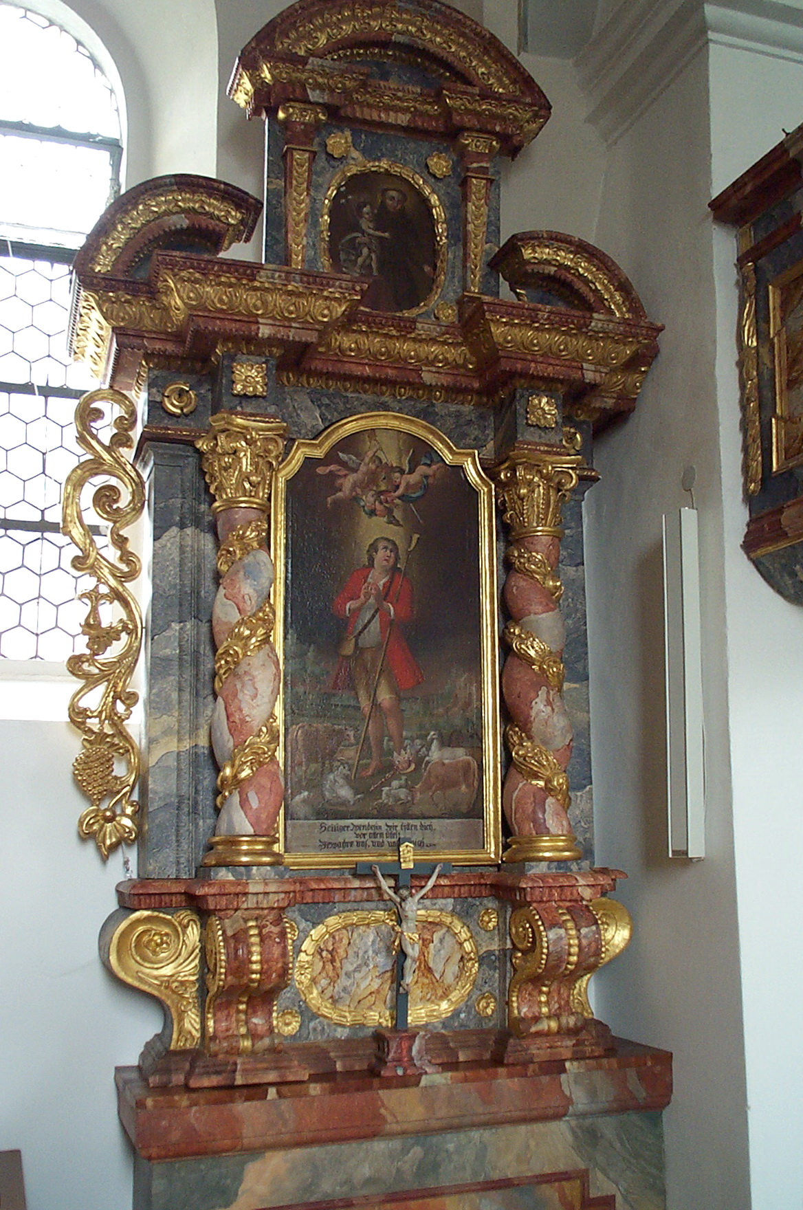 Herrngiersdorf, Semerskirchen, Am See 1. Katholische Pfarrkirche Mariä Himmelfahrt. Am nördlichen (linken) Seitenaltar ist im Hauptbild der heilige Wendelin dargestellt, im ovalen Auszugsbild der heilige Antonius von Padua.